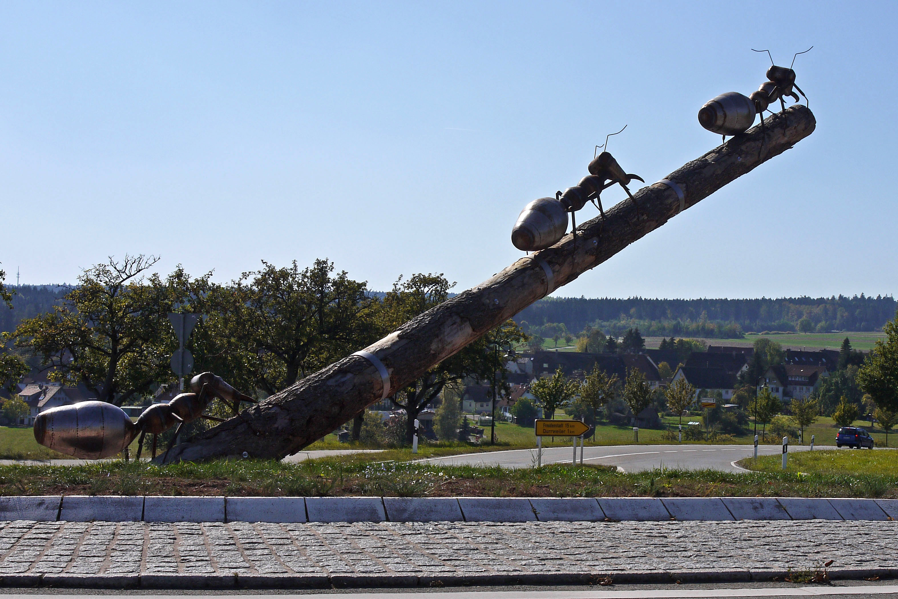 "Ameisen" der Spitzname der Weiler Bürger zieren den Ortseingang